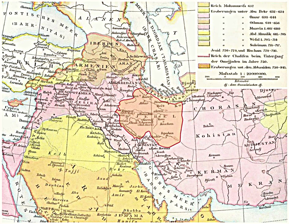 Die Lage von Dschibal auf Basis folgender Karte: 'Das Reich der Kalifen bis 945' aus Gustav Droysens Allgemeiner historischer Handatlas in 96 Karten mit erläuterndem Text Bielefeld [u.a.]: Velhagen & Klasing 1886, S. 77.